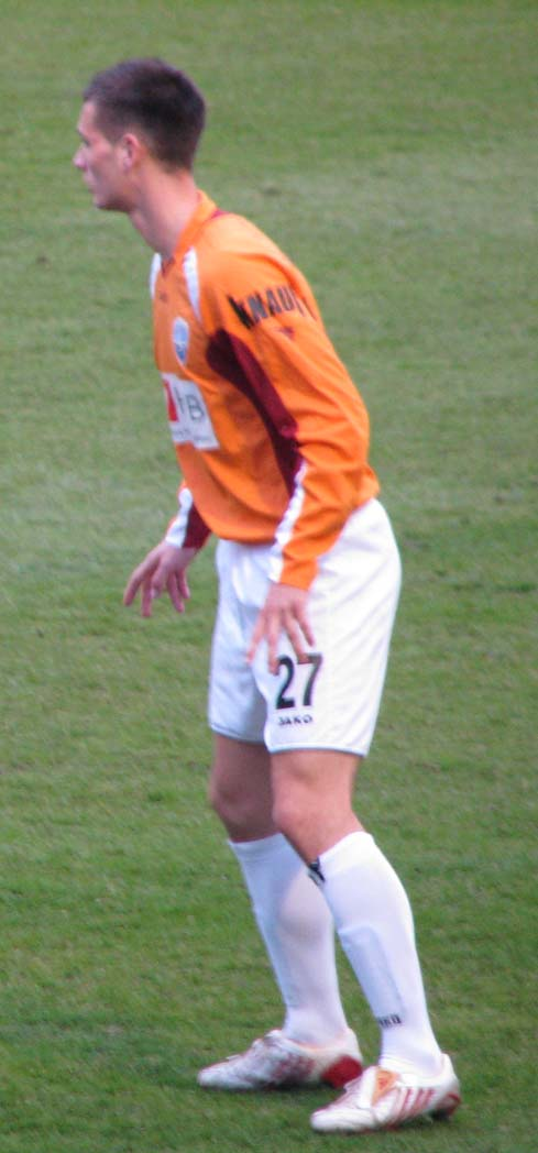 Hrvoje Spahija